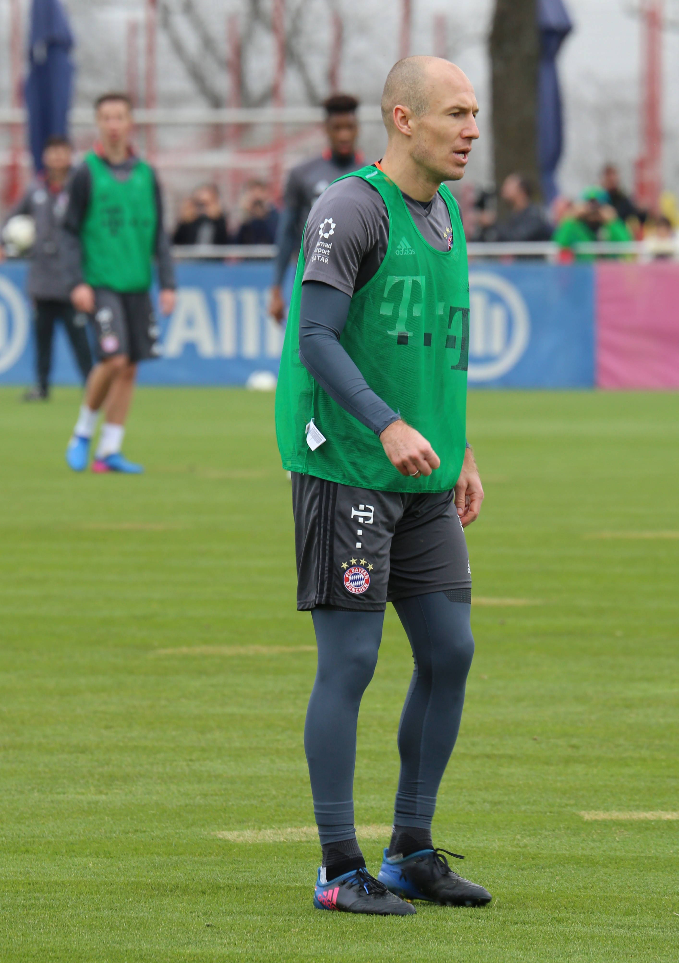 Arjen Robben, am 14. März 2017 beim Training auf dem Gelände des FC Bayern München